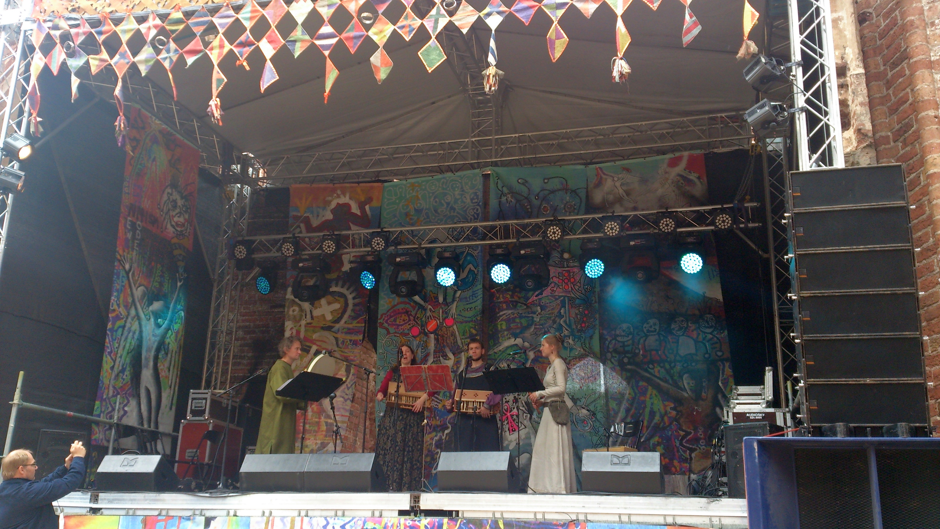 Rondellus Tartu hansapäevadel 2014